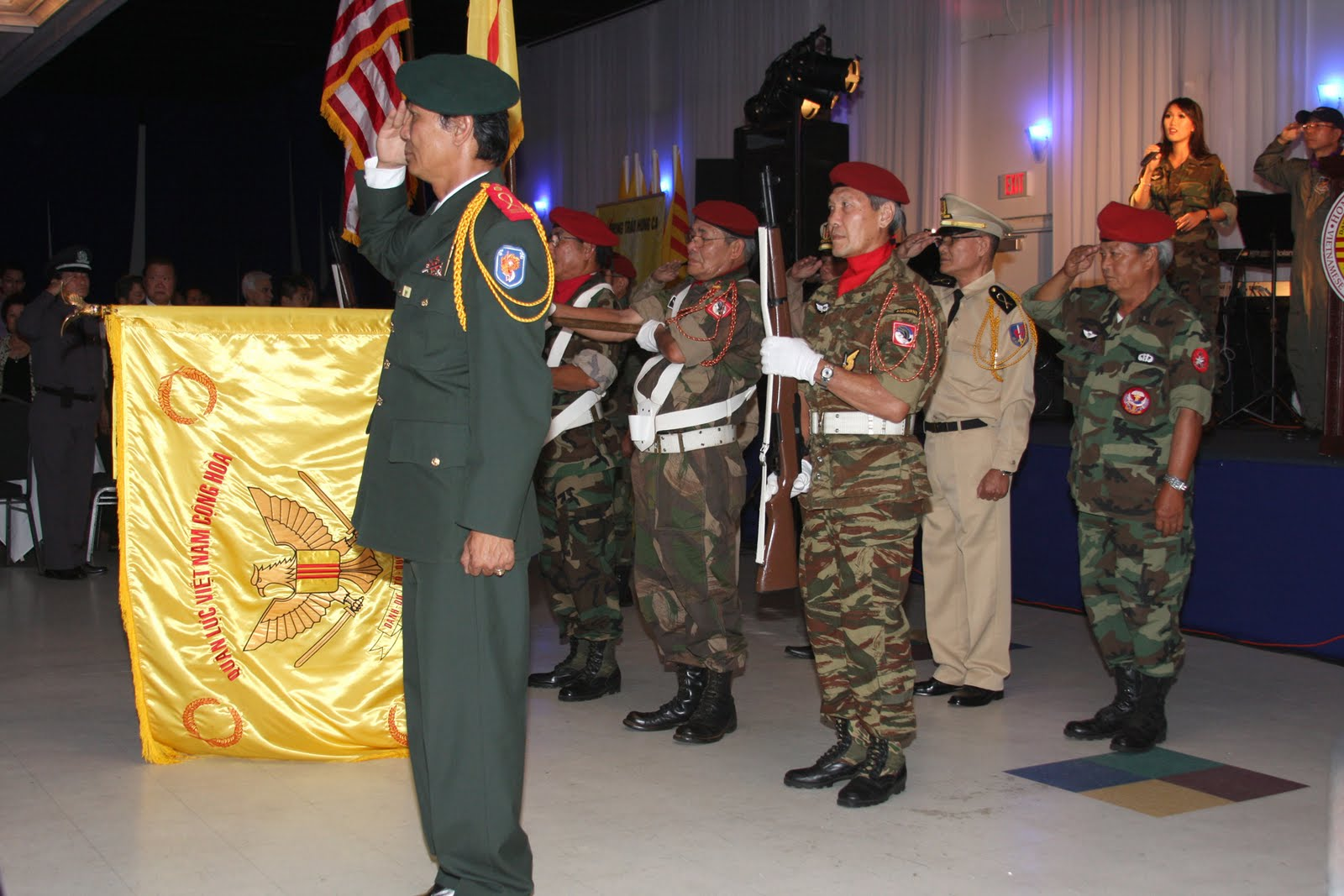 The flag of ARVN, used since 1955 to 1975.